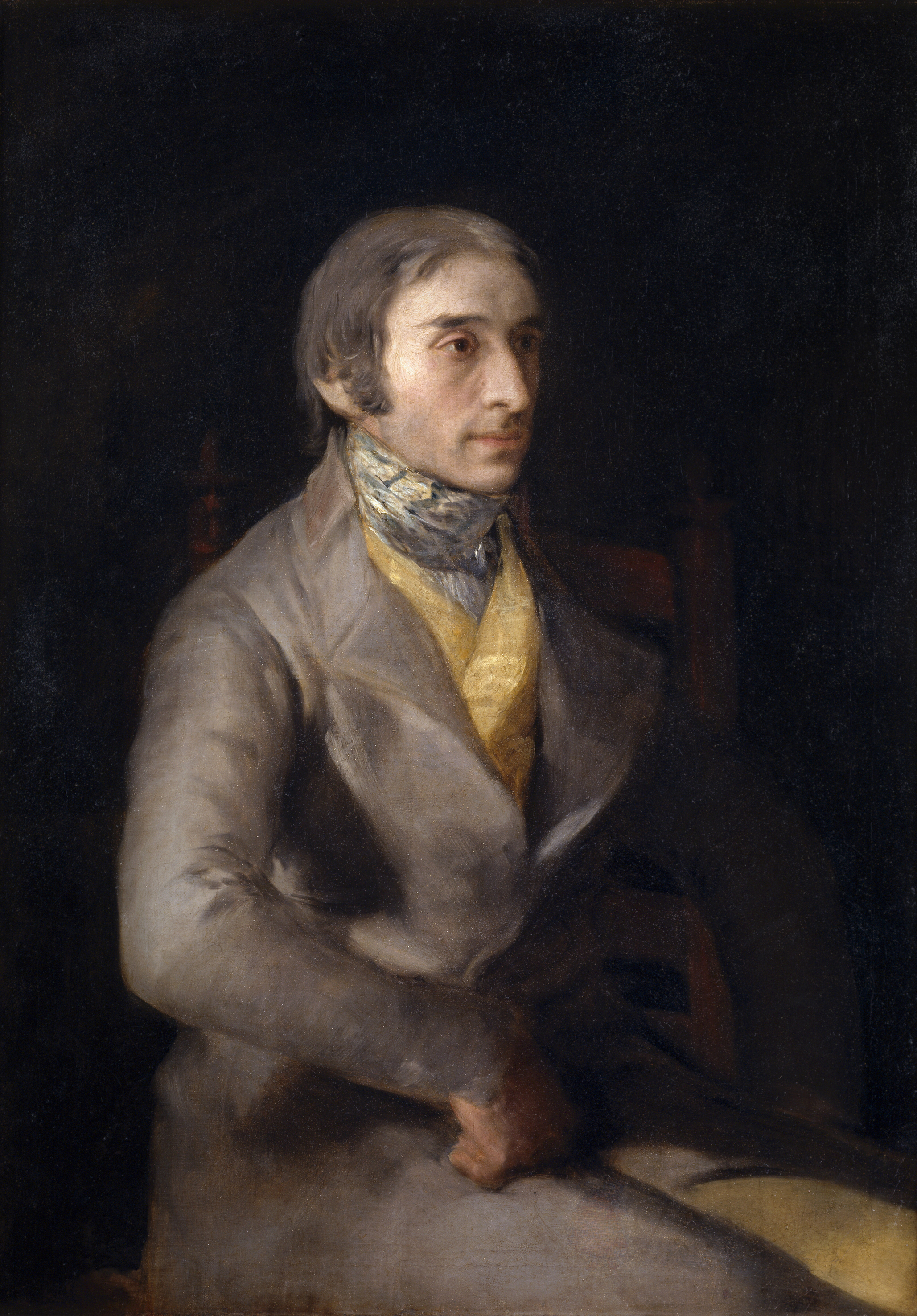 Manuel Silvela y García de Aragón Museo del Prado (Madrid, España).